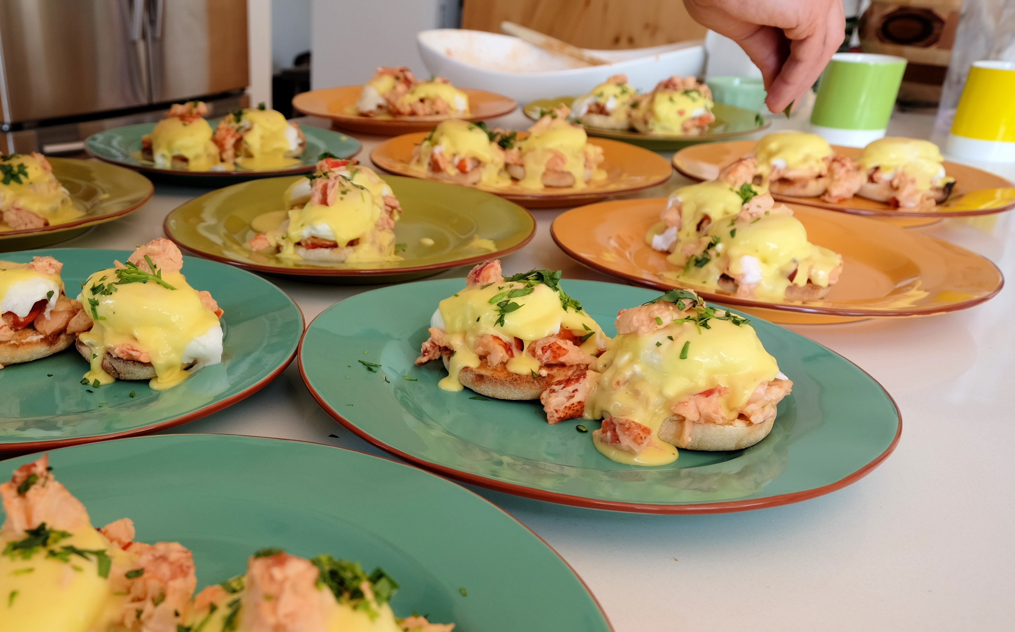 Lobster Benedict